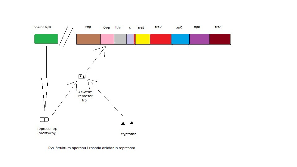 Schemat przedstawiający operon tryptofanowy